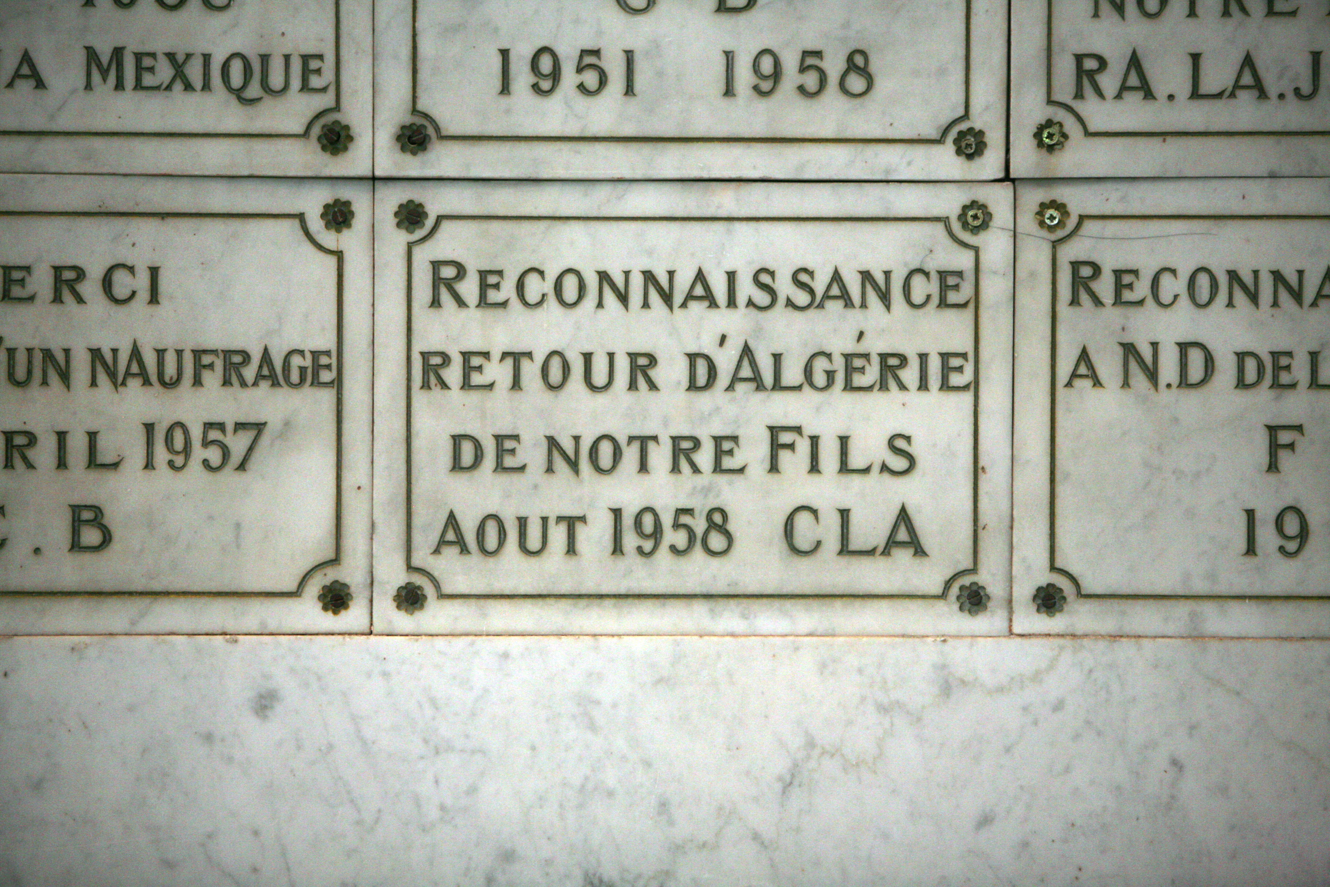 Ex voto in Notre-Dame de la Garde